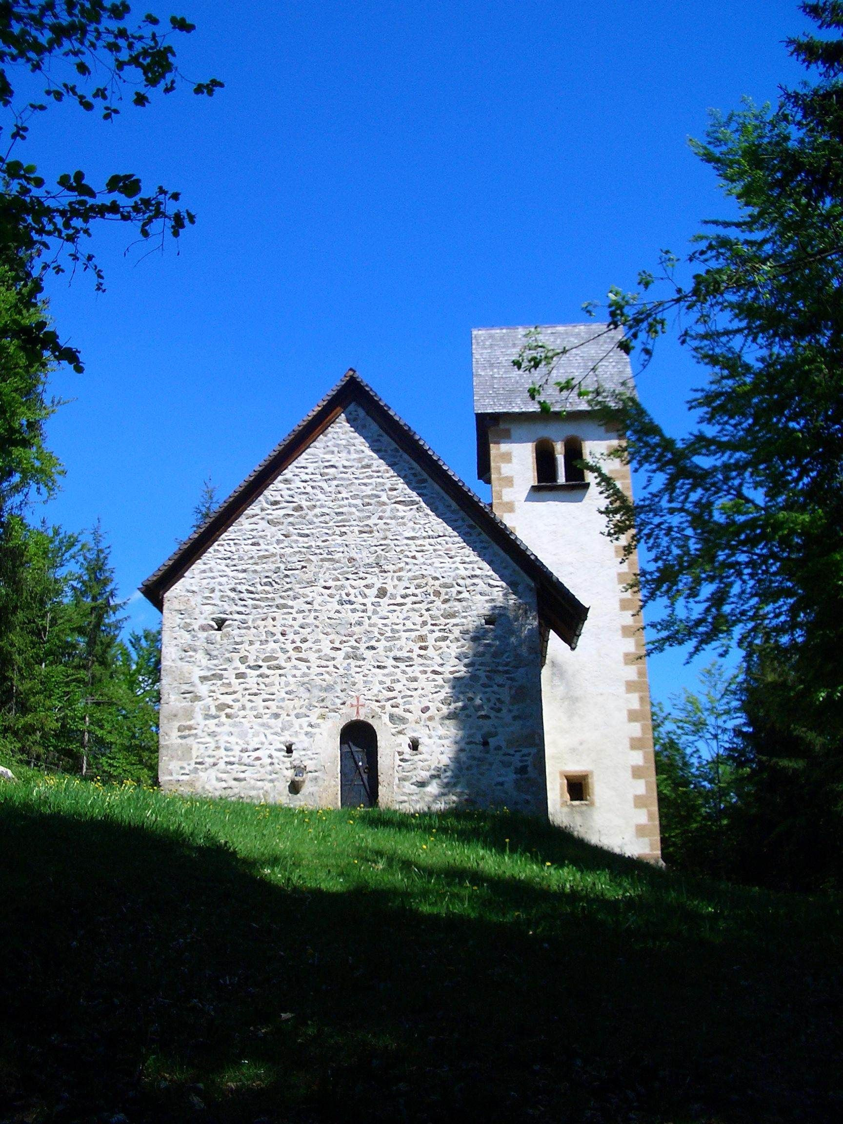 Kirche St. Helena am Wieserberg